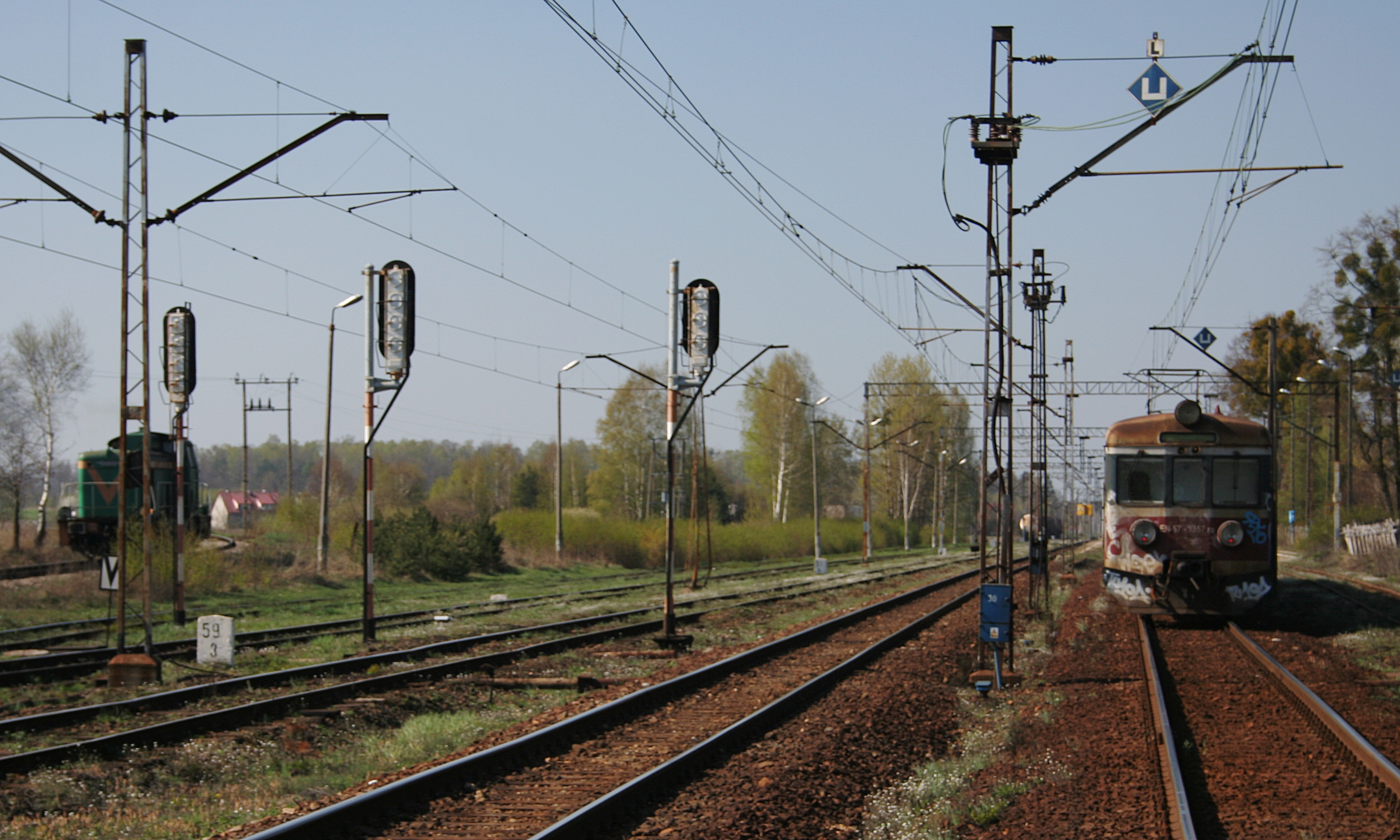 Stacja kolejowa Boronów - fragment